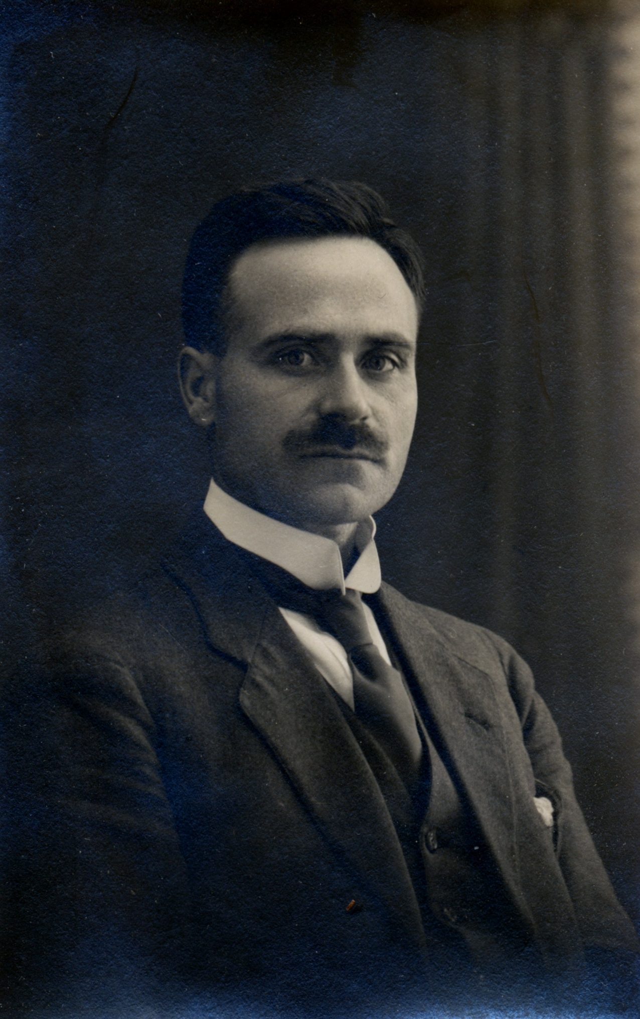 Peter Aune (1884–1964), lærer og ordfører (V) på Skatval.